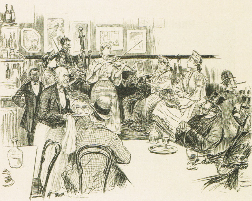 Le Café Volpini à l'Exposition Universelle, publié dans L'Exposition Universelle de 1889, F.G. Dumas et L. de Fourcaud (1889)